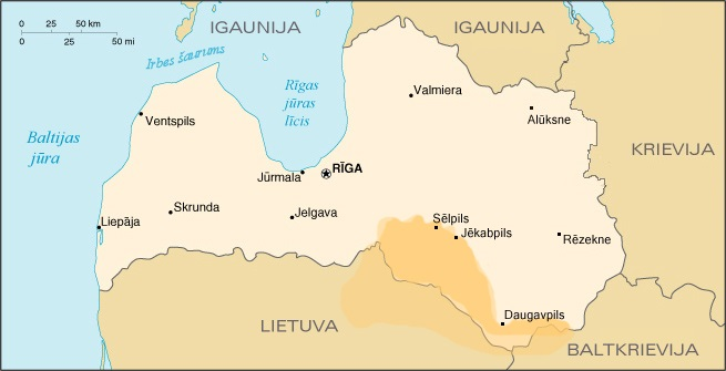 Aptuvenā Sēlijas teritorija spriežot pēc daudzām vēstures grāmatām un liecībām